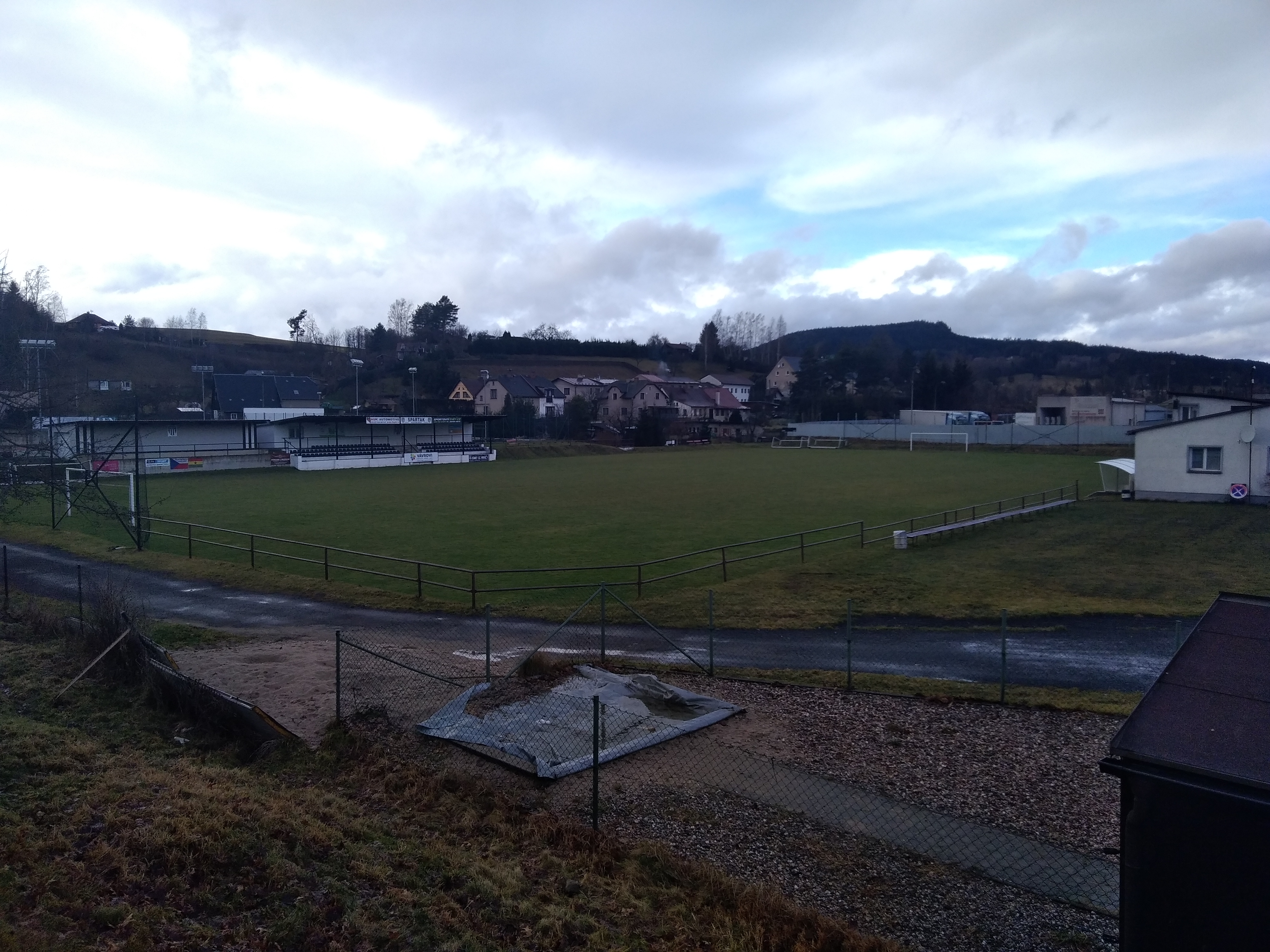 Fotbalový stadion v Polici nad Metují, domovský stadion celku TJ Spartak Police nad Metují.